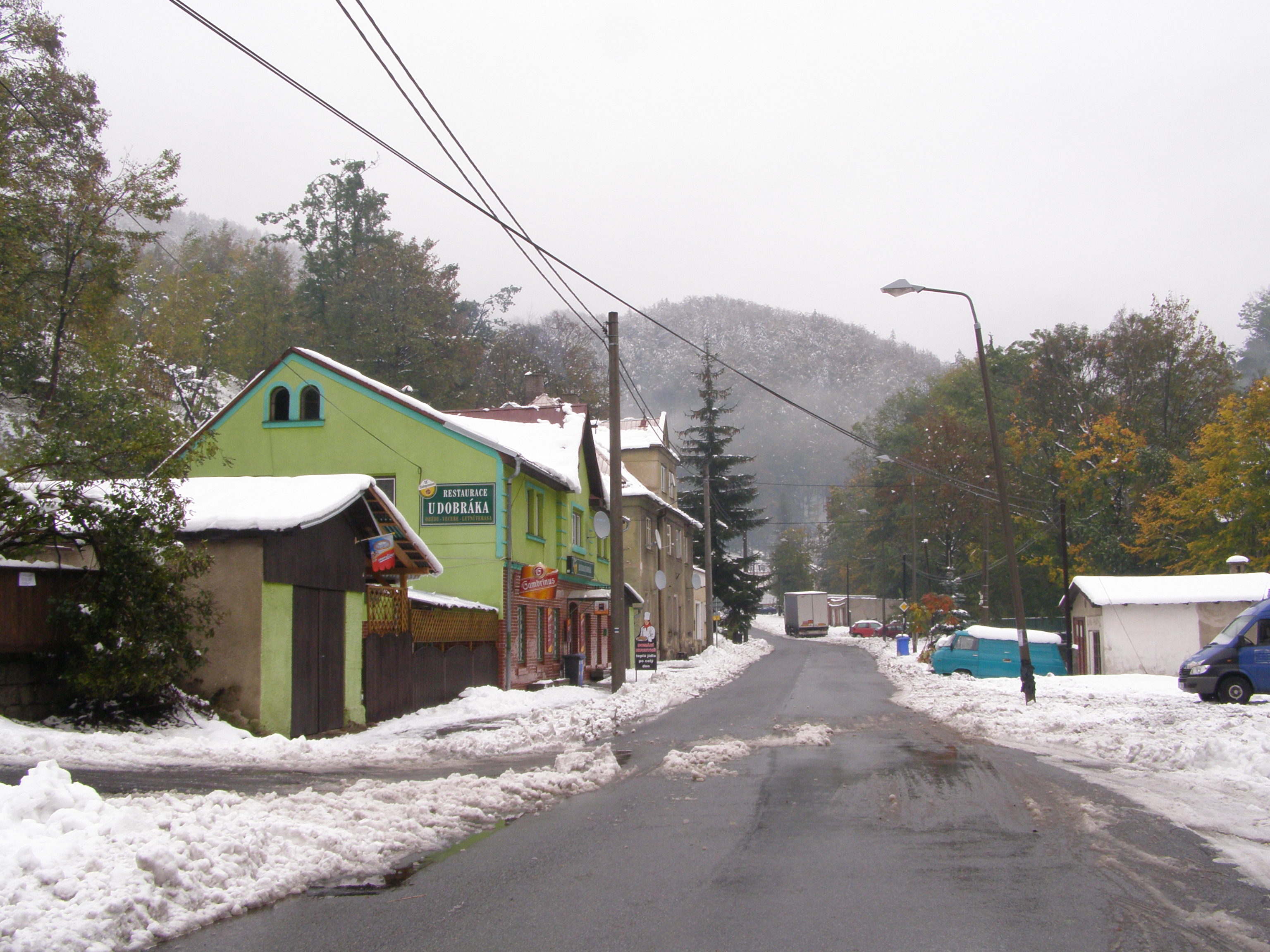 Česky: Liberec, část Kateřinky, ulice Kateřinská